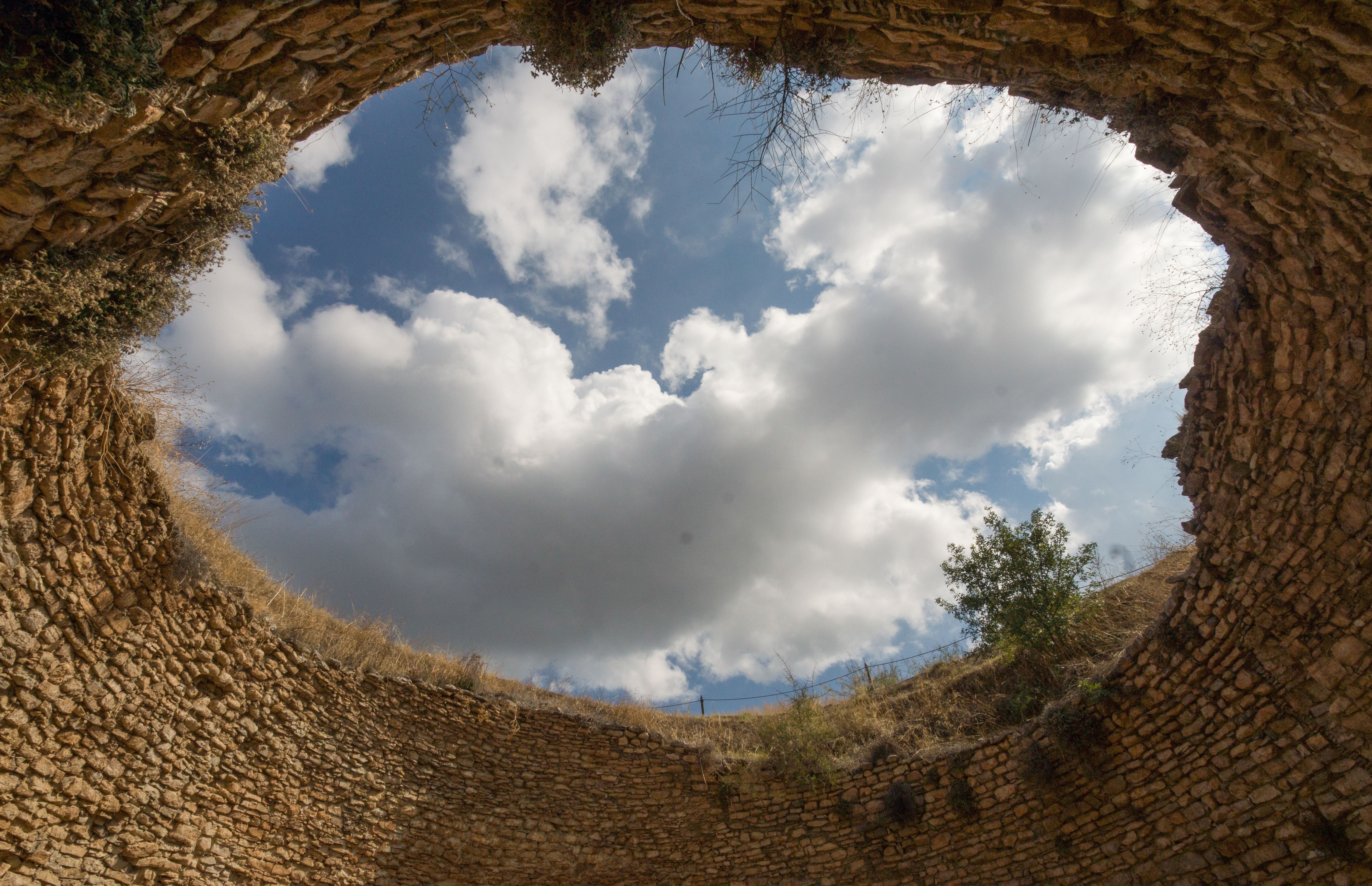 Grab des Aigisthos im antiken Mykene, Griechenland.